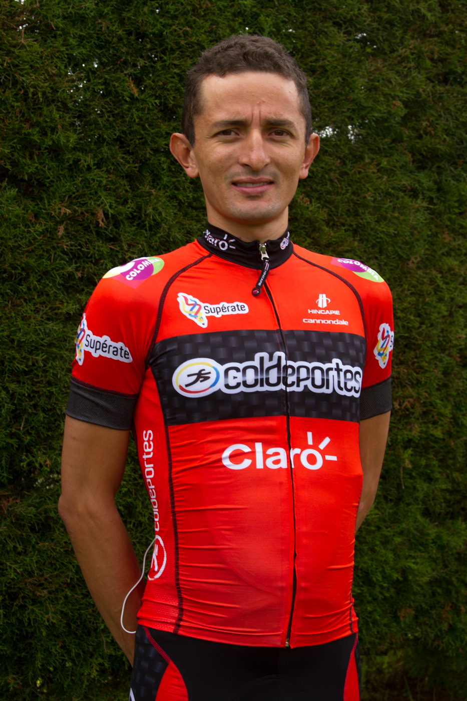 Julián Rodas con el maillot del Colombia Coldeportes en 2013.